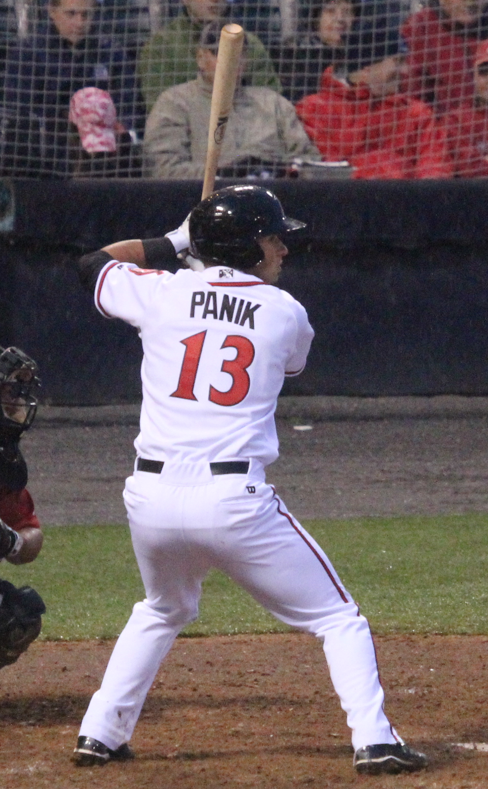 Joe Panik